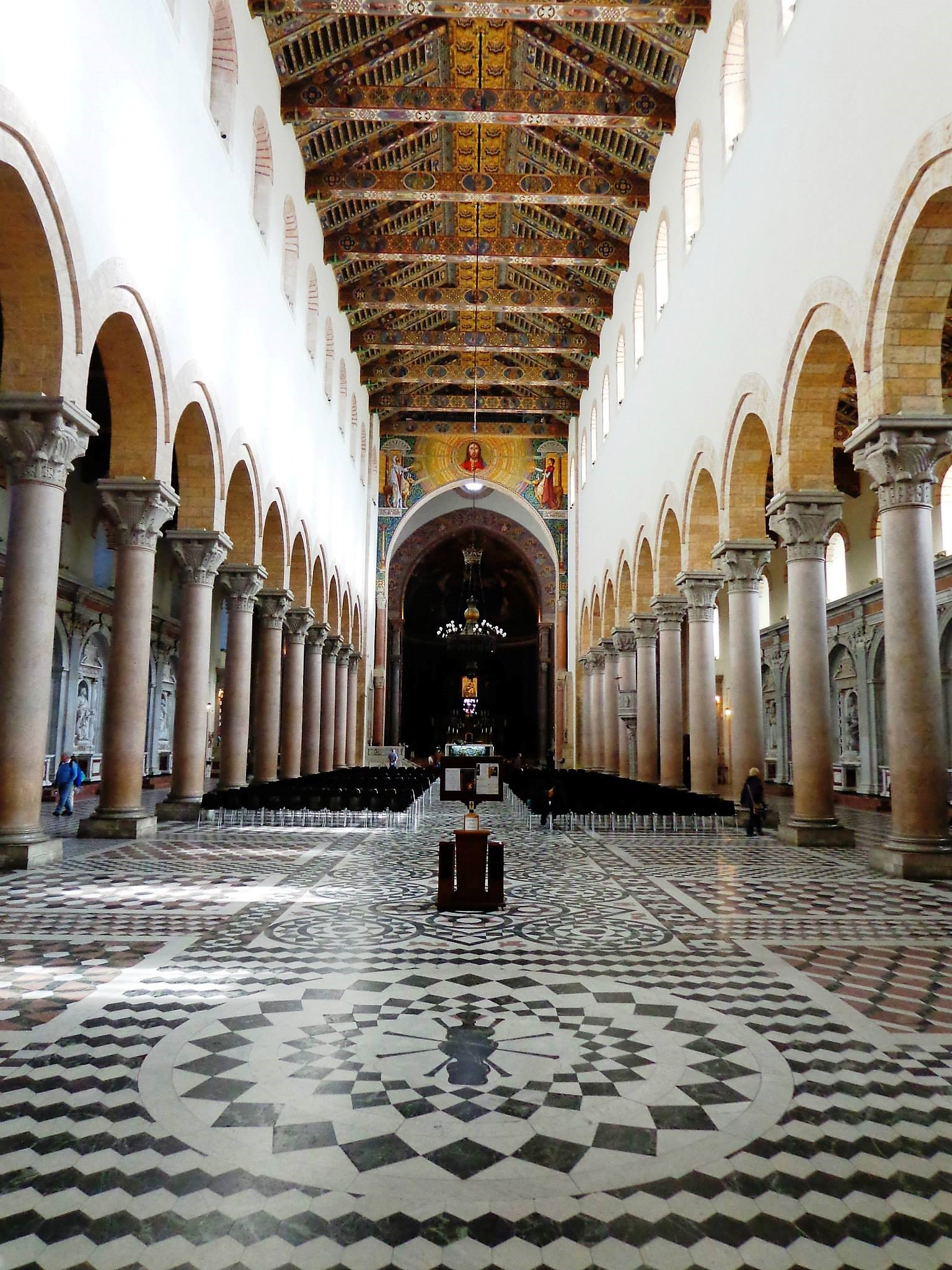 Navata